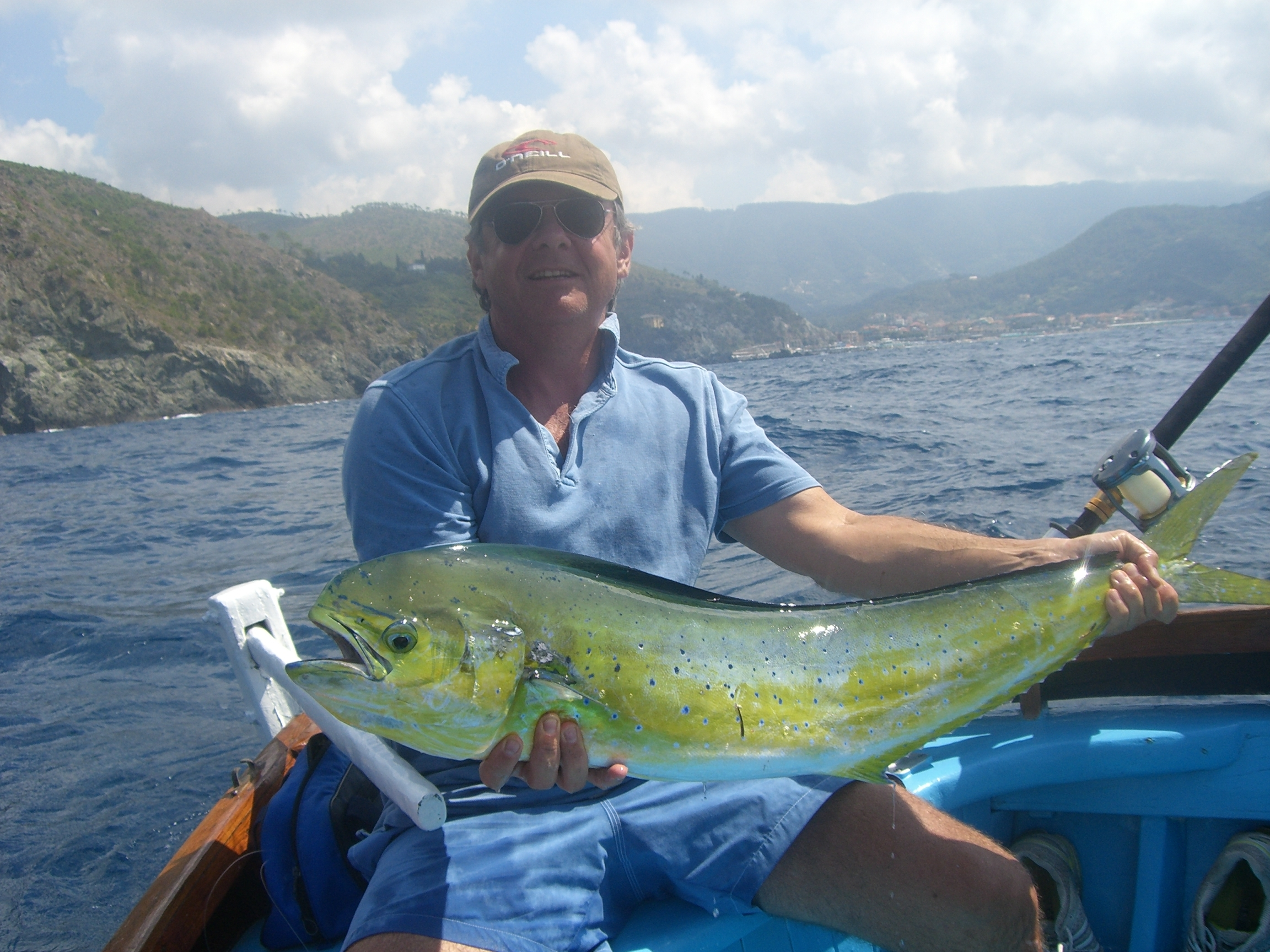 Lampuga (Coryphaena hippurus), Levanto (SP)